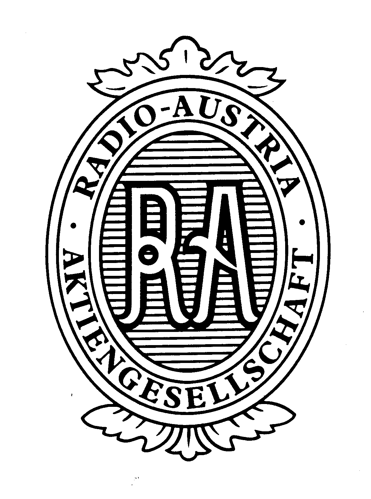 Altes Emblem der Radio-Austria AG